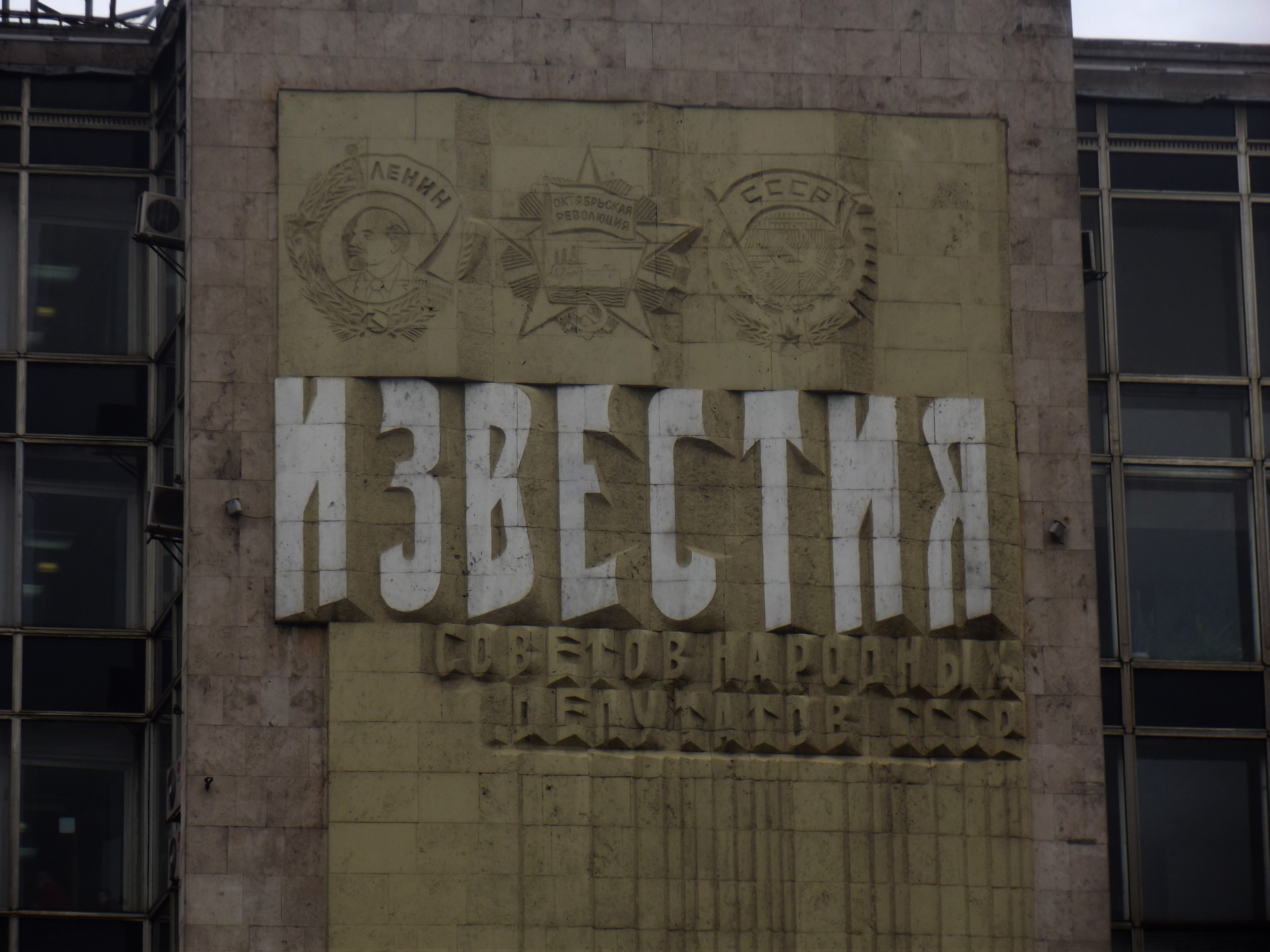 Барельеф на бывшем здании редакции газеты "Известия"